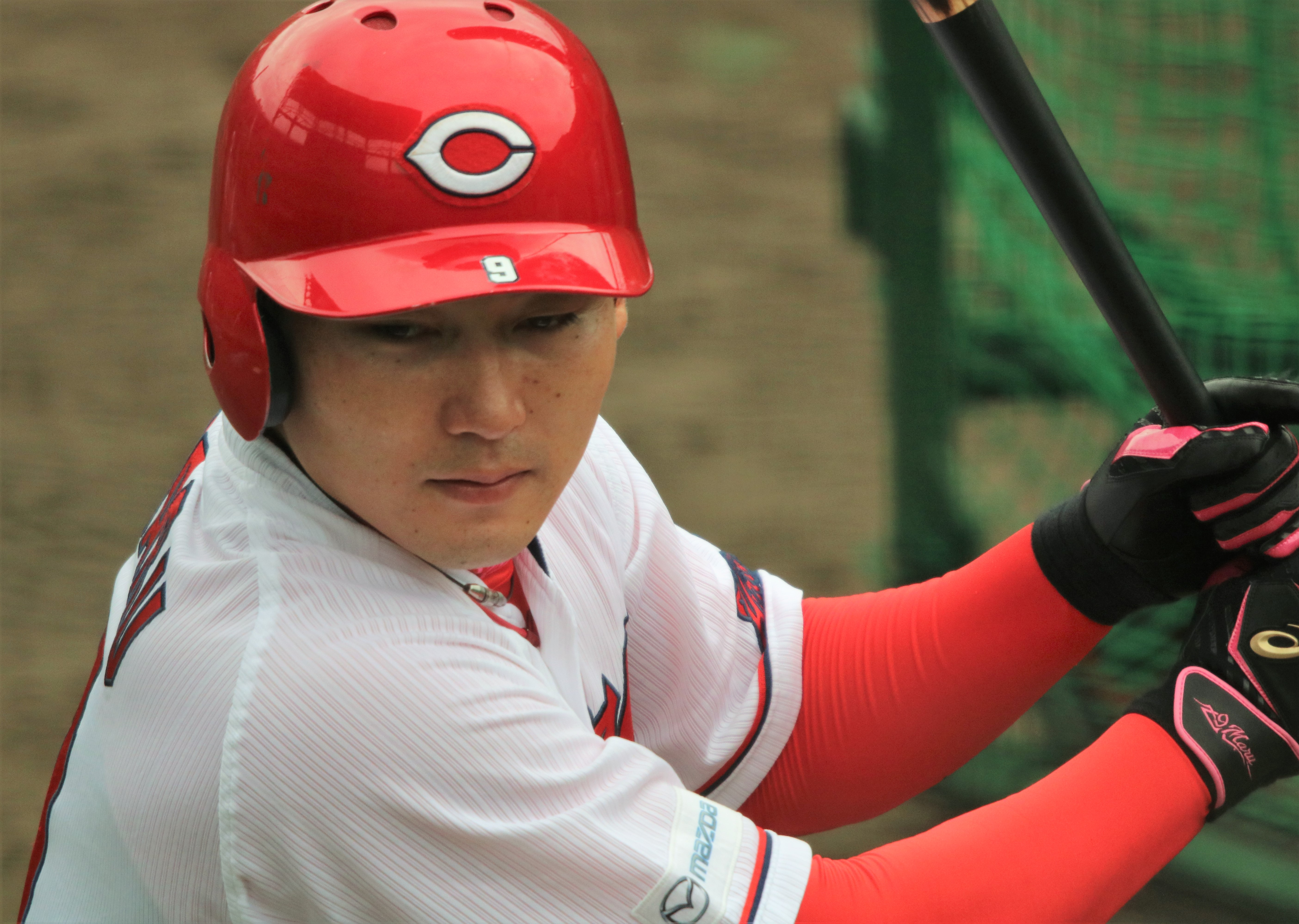 2017/11/7 天福球場